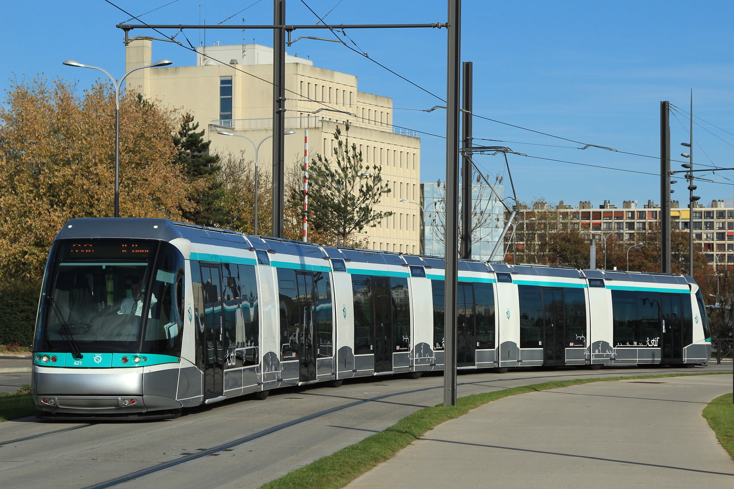 Le Translohr n°621 entre Vélizy 2 et Dewoitine sur la ligne 6 du tramway d'Île-de-France.